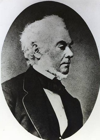 Carl Eduard Dahmen, Versicherungskaufmann und 2. Aachener Bürgermeister (Baubürgermeister), kgl. Bayrischer Konsul, ca. 1870